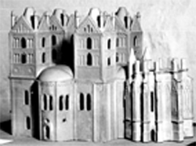 Marienkirche, Modell aus dem 18.Jhrhndrt